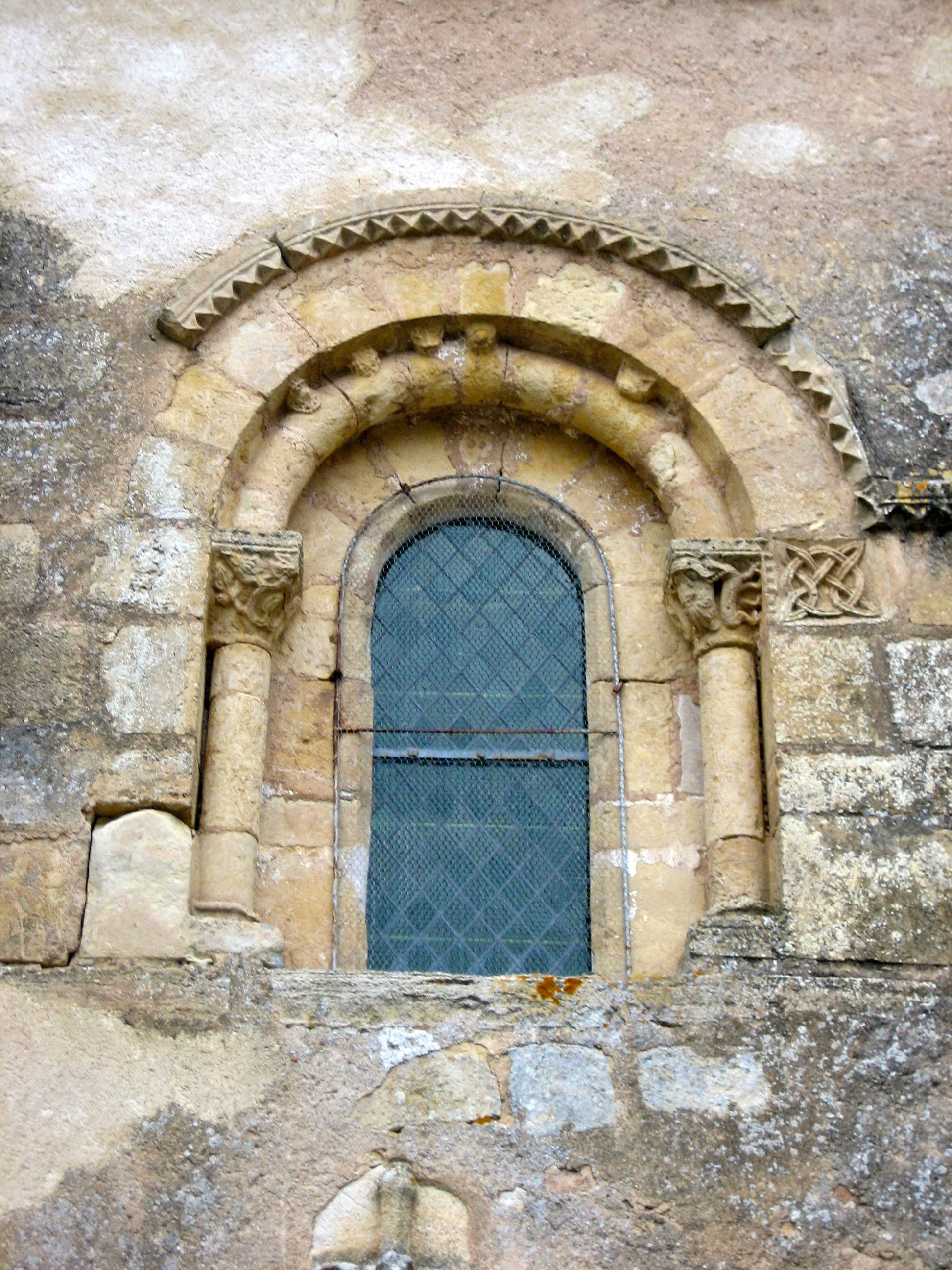 Fenêtre romane sur le mur sud de la nef de l'église Saint-Georges à Saint-Jeanvrin